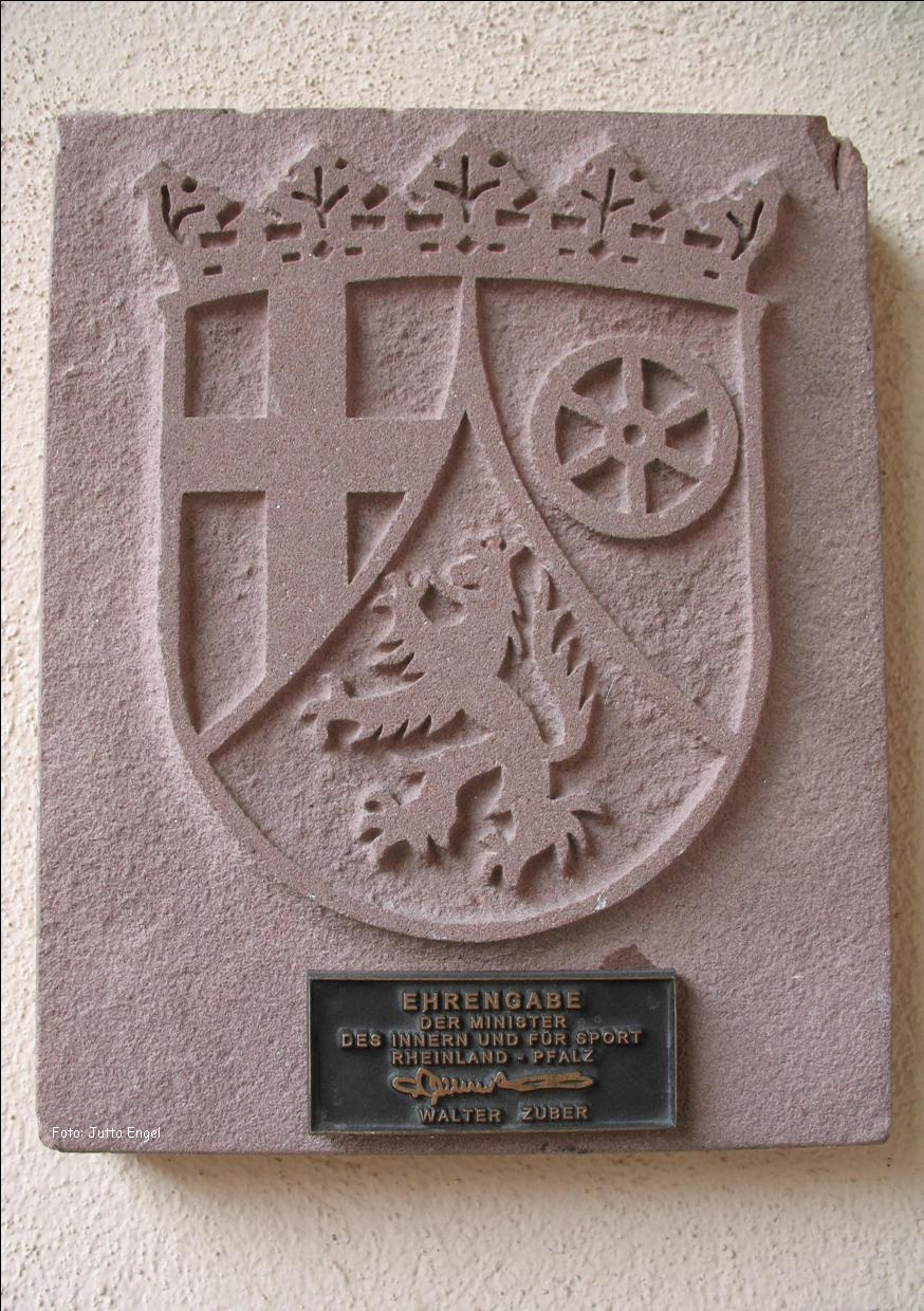 Ehrengabe des Ministers für Inneres und Sport von Rheinland-Pfalz